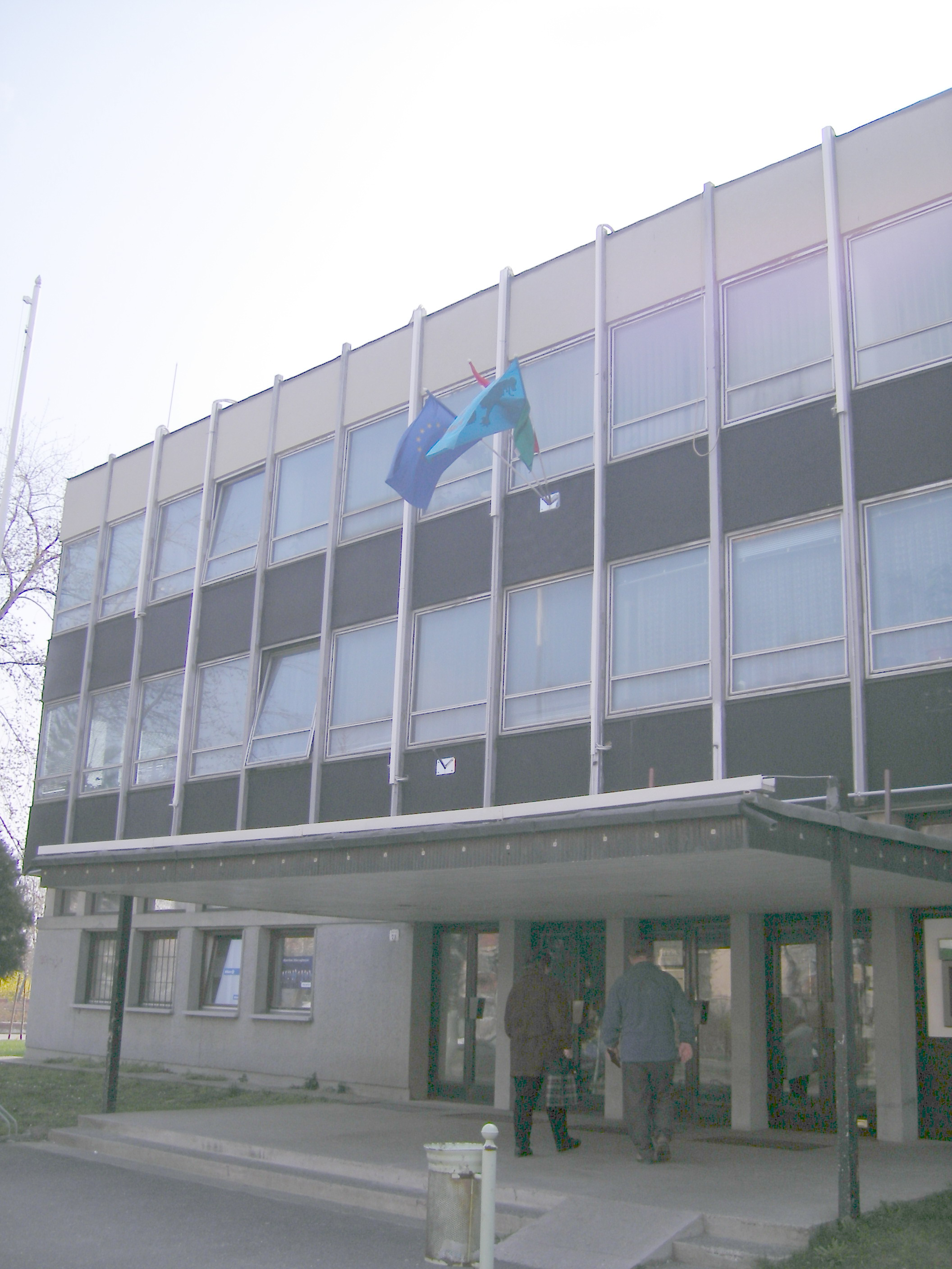 Oroszlány - városháza